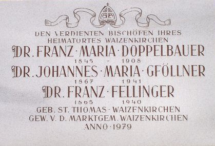 Gedenkstein an die Bischöfe Franz Maria Doppelbauer (*1845) und Johannes Maria Gföllner (*1867)